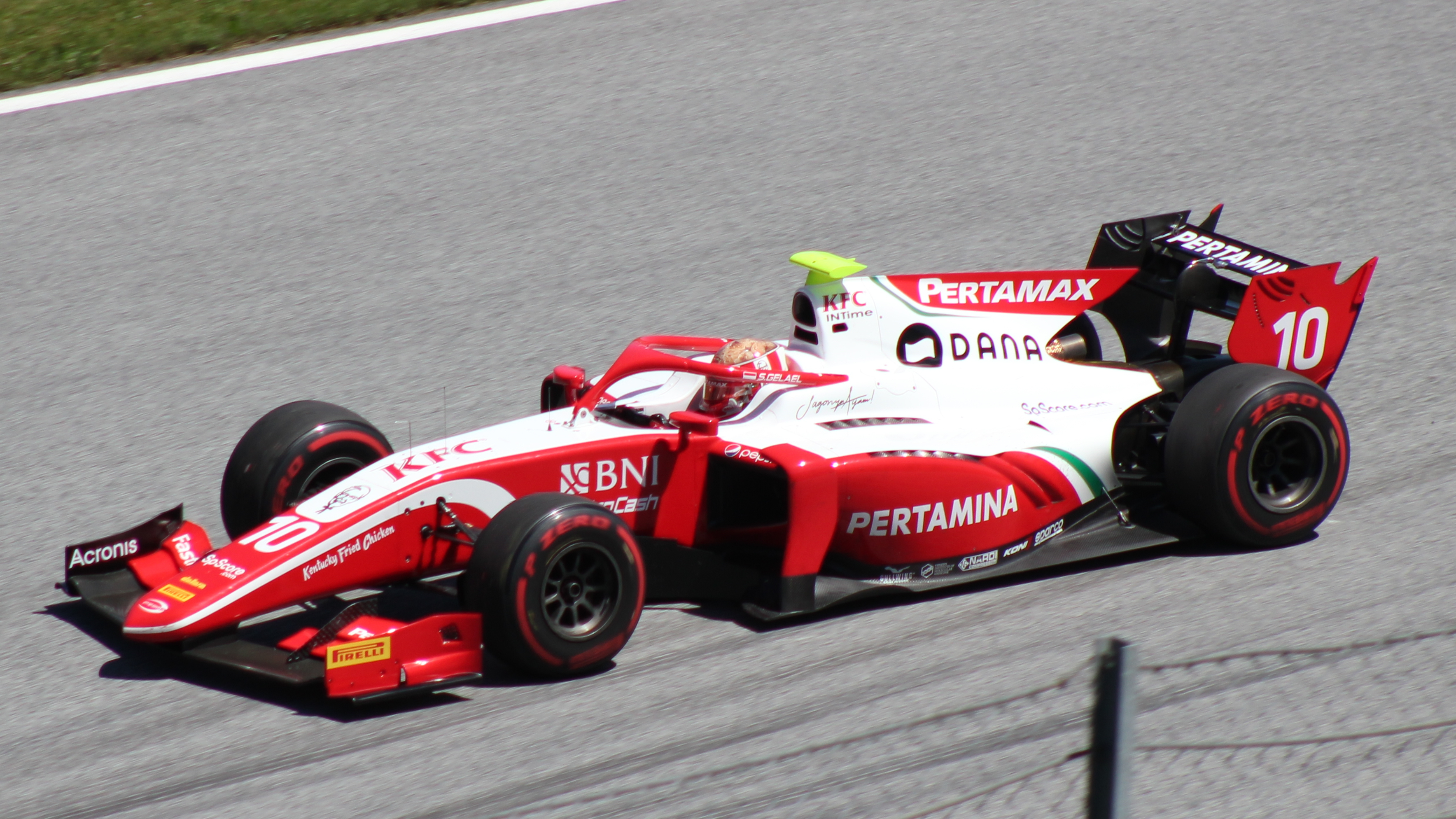 Gelael beim Rennwochenende in Österreich 2019